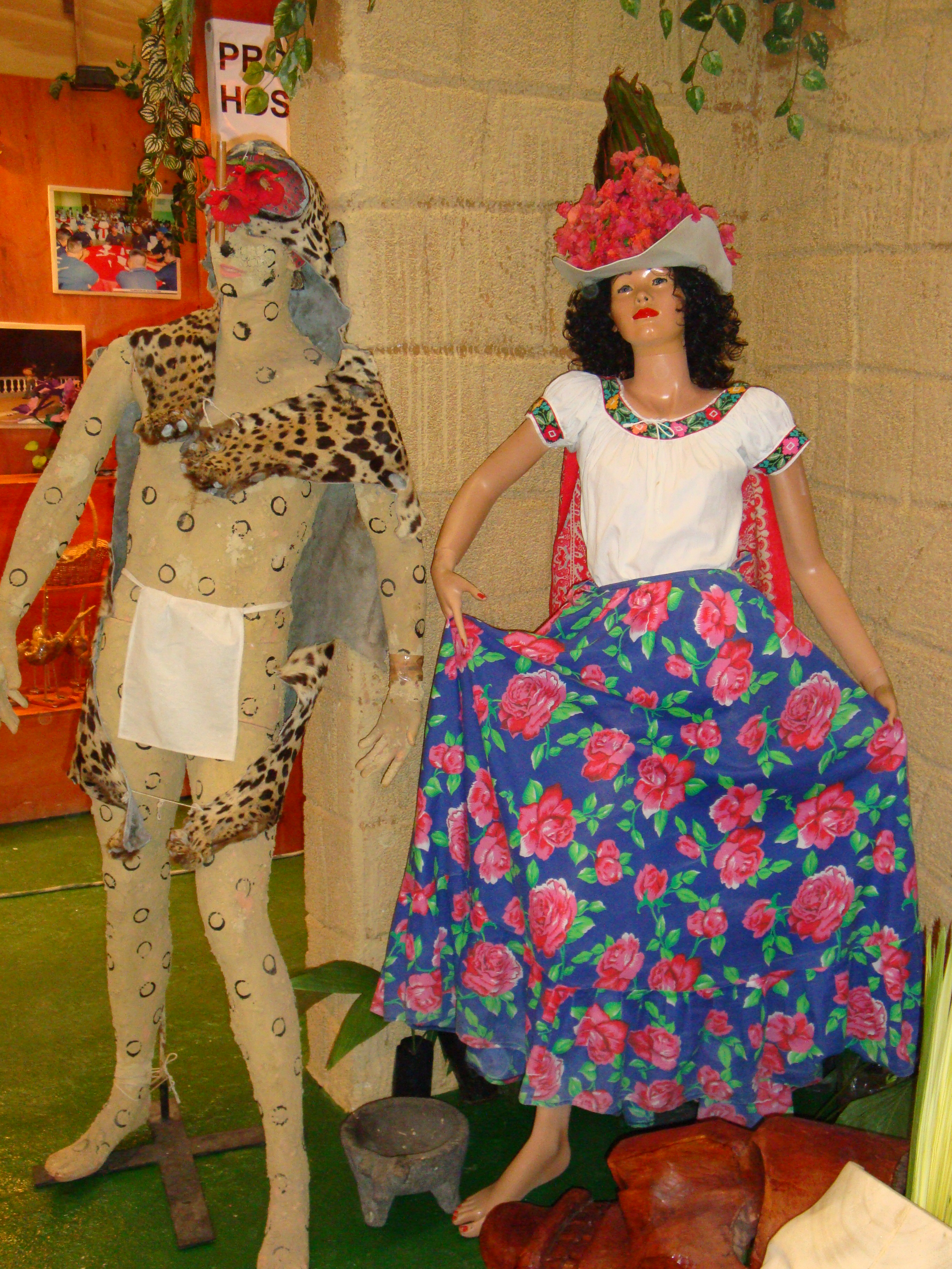 Indumentaria típica de tigres (izq.) y pochoveras (der.) usadas en la danza del Pochó.